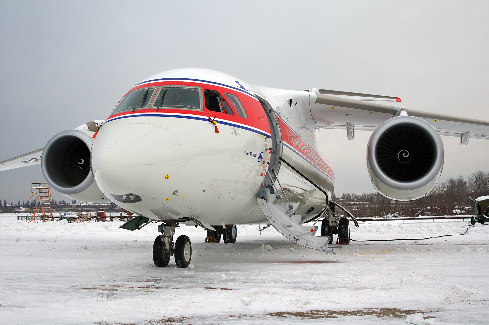 Air Koryo Antonov An-148-100B